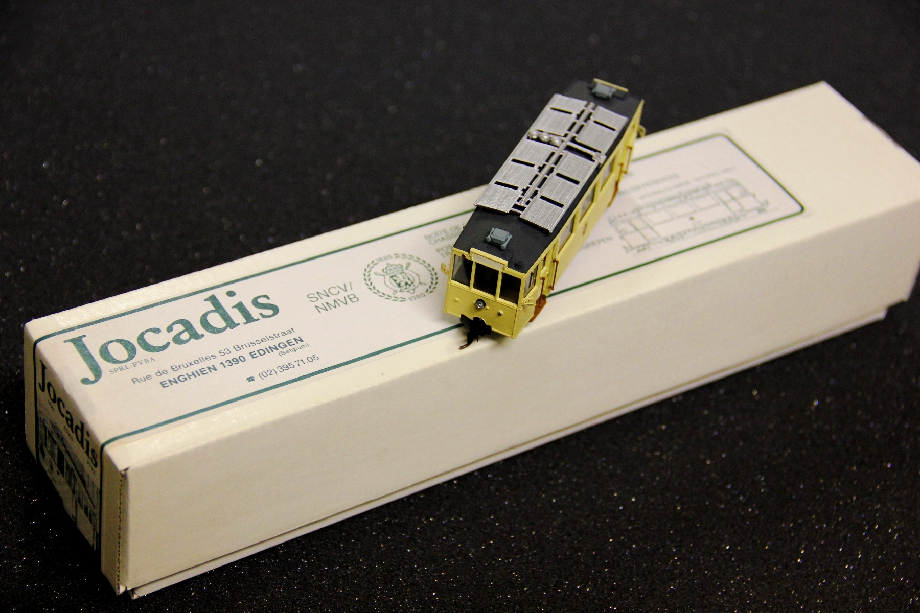 Mots-clés : modélisme ferroviaire; HOm; Jocadis; kit; autorail; chemins de fer vicinaux; SNCV